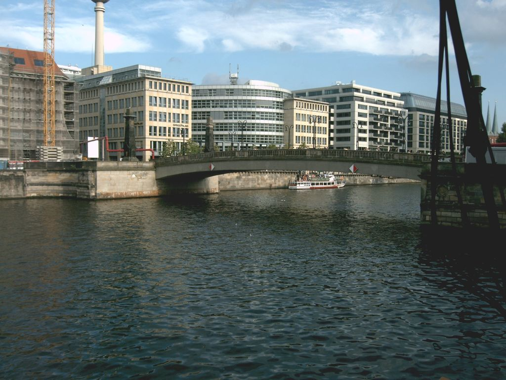 Friedrichsbrücke in Berlin-Mitte (Fußgängerbrücke) über die Spree, zwischen Liebknechtbrücke und Monbijoubrücke. View from left river bank, looking Southeast. other version: Image:Friedrichsbrücke Berlin Mitte w.jpg